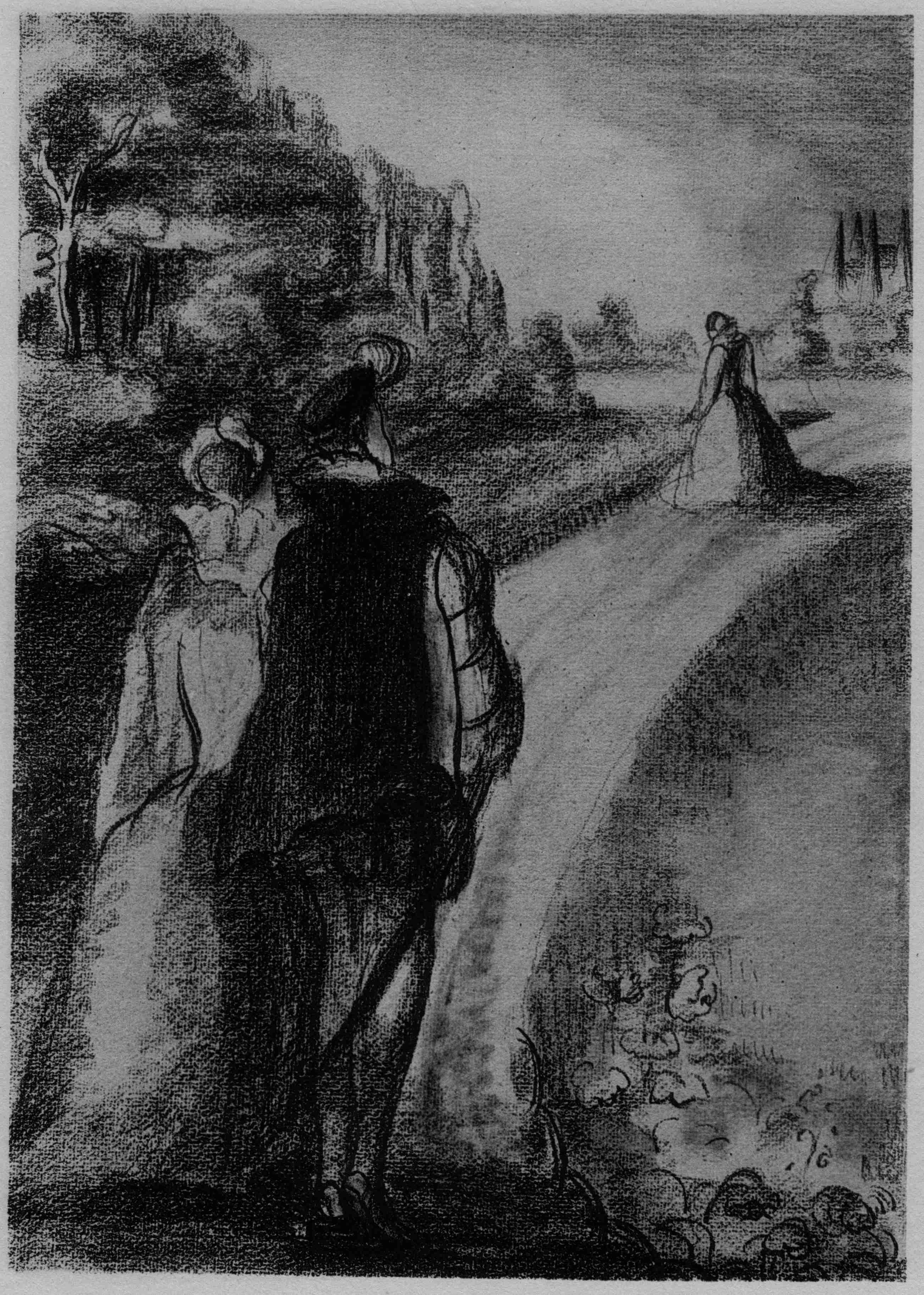 Frontispice de La Princesses de Clèves de Mme de La Fayette, coll. Les Chefs-d'Œuvres illustrés, Éditions de la pléiade, J. Jiffrin 1929